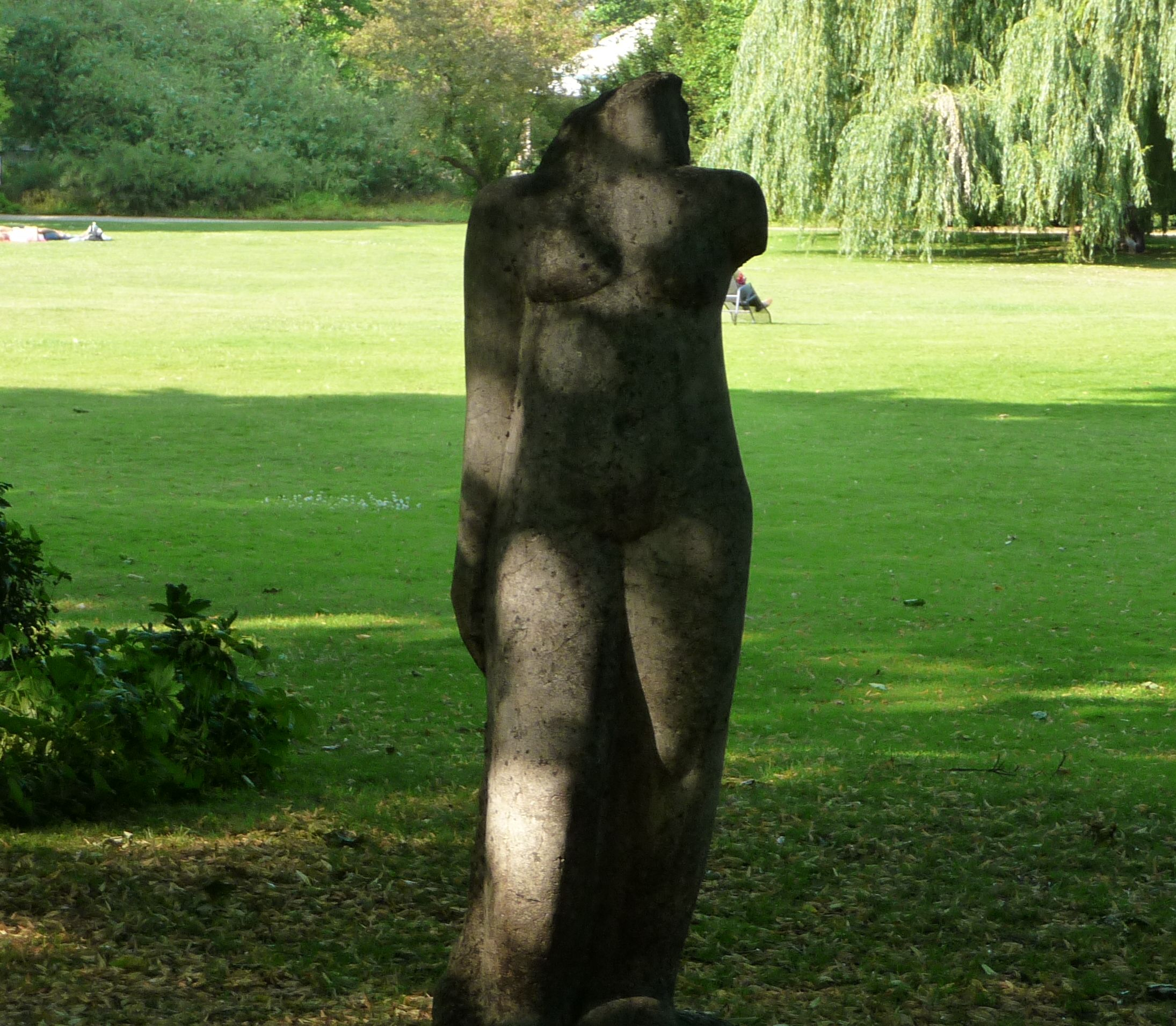 Anna Mahler Torso